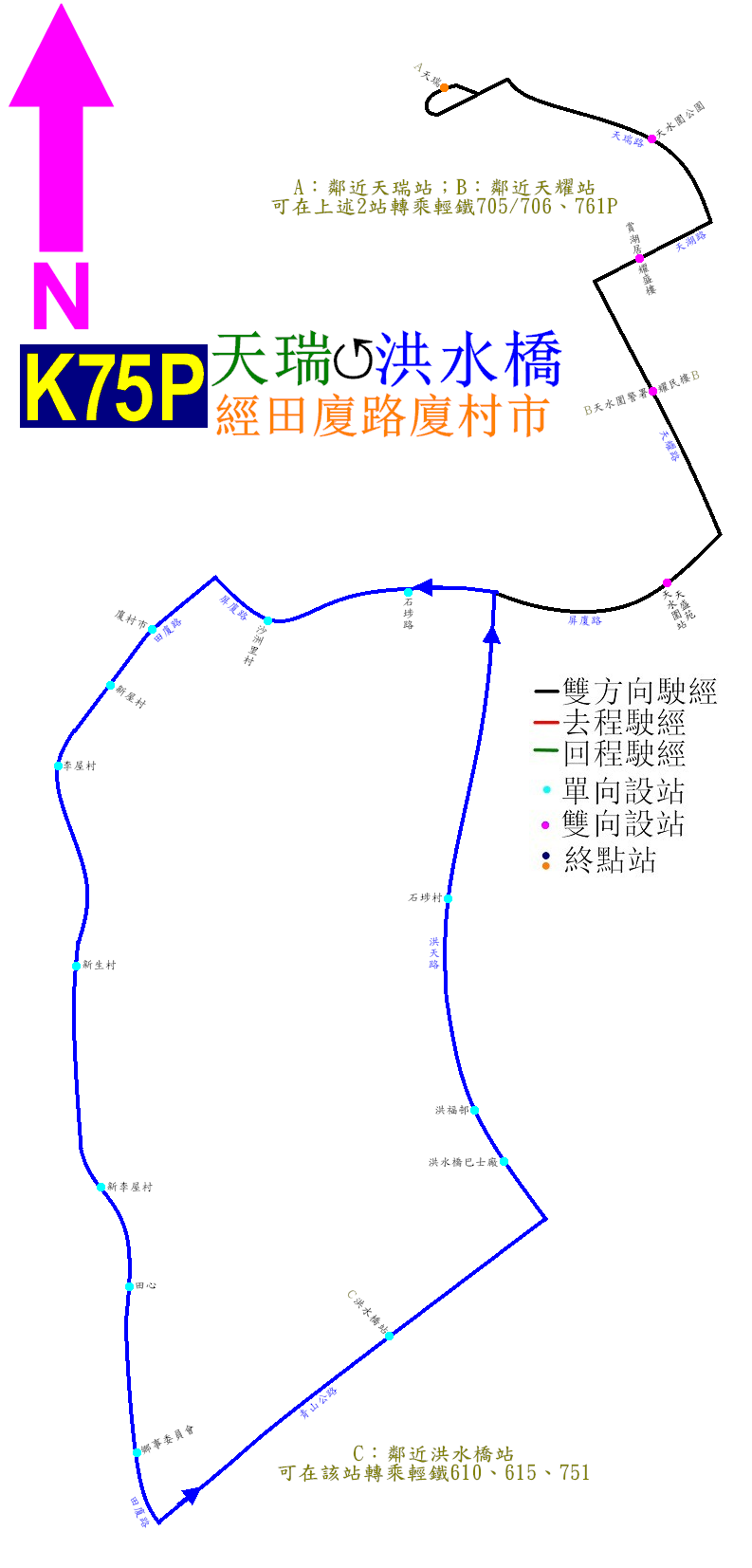 中文（香港）: 港鐵巴士K75P線的走線圖